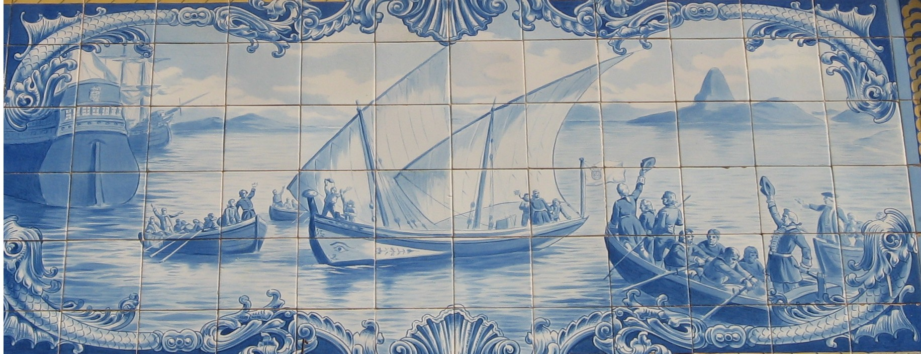 Chegada